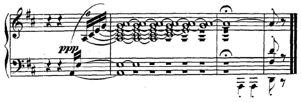 Robert Schumann, Schlusstakte der Papillons